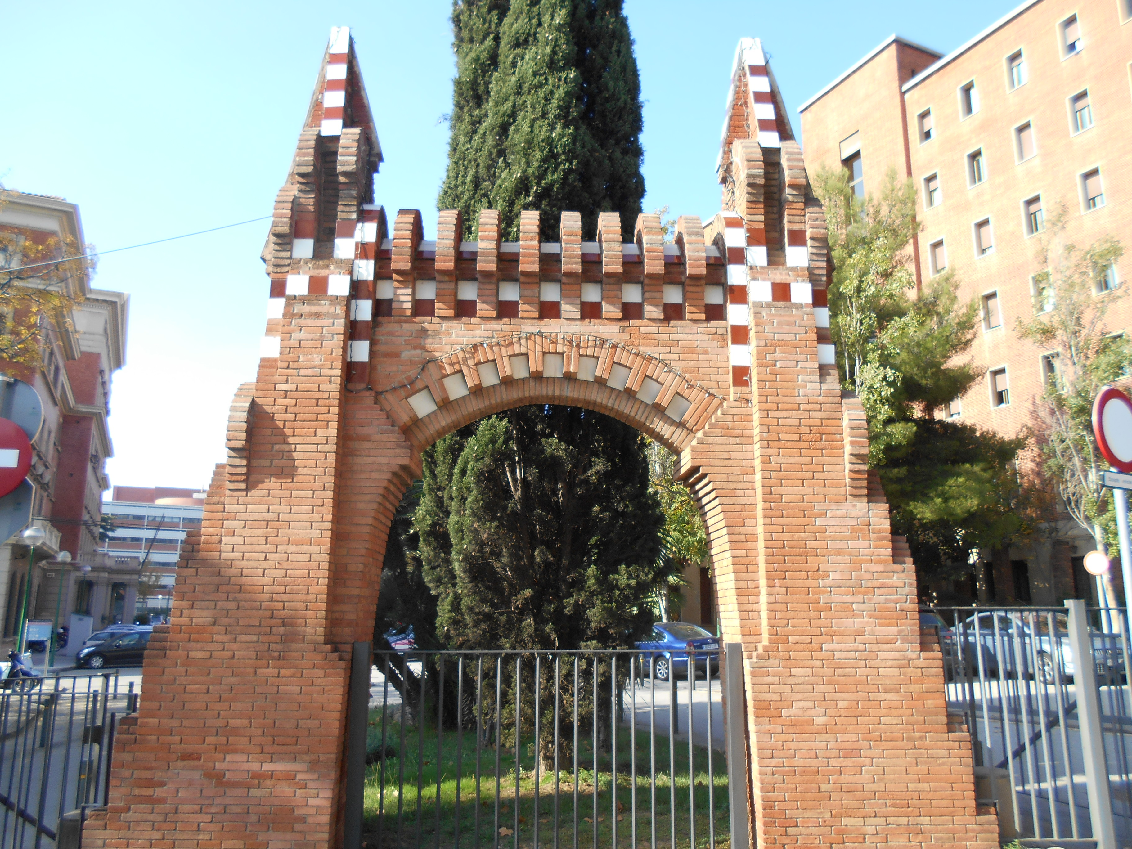 Puerta este de la finca Güell.